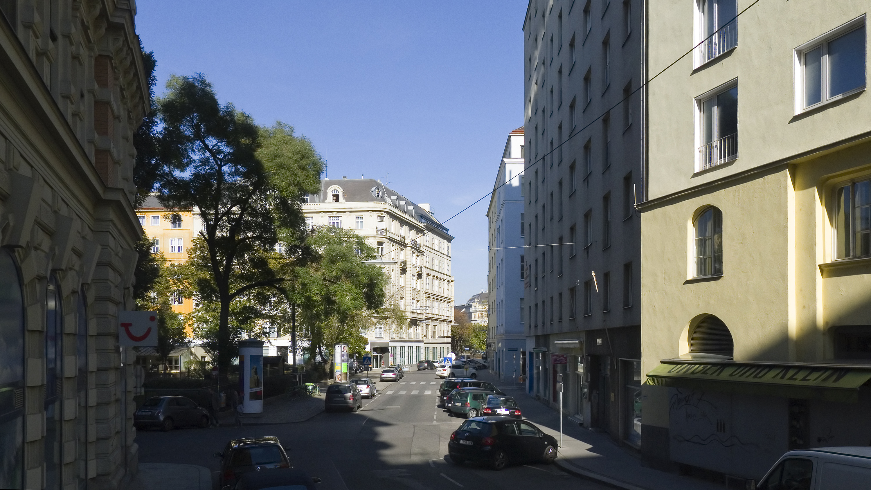 Gölsdorfgasse in Wien 1 bei Nr. 3 Richtung Norden